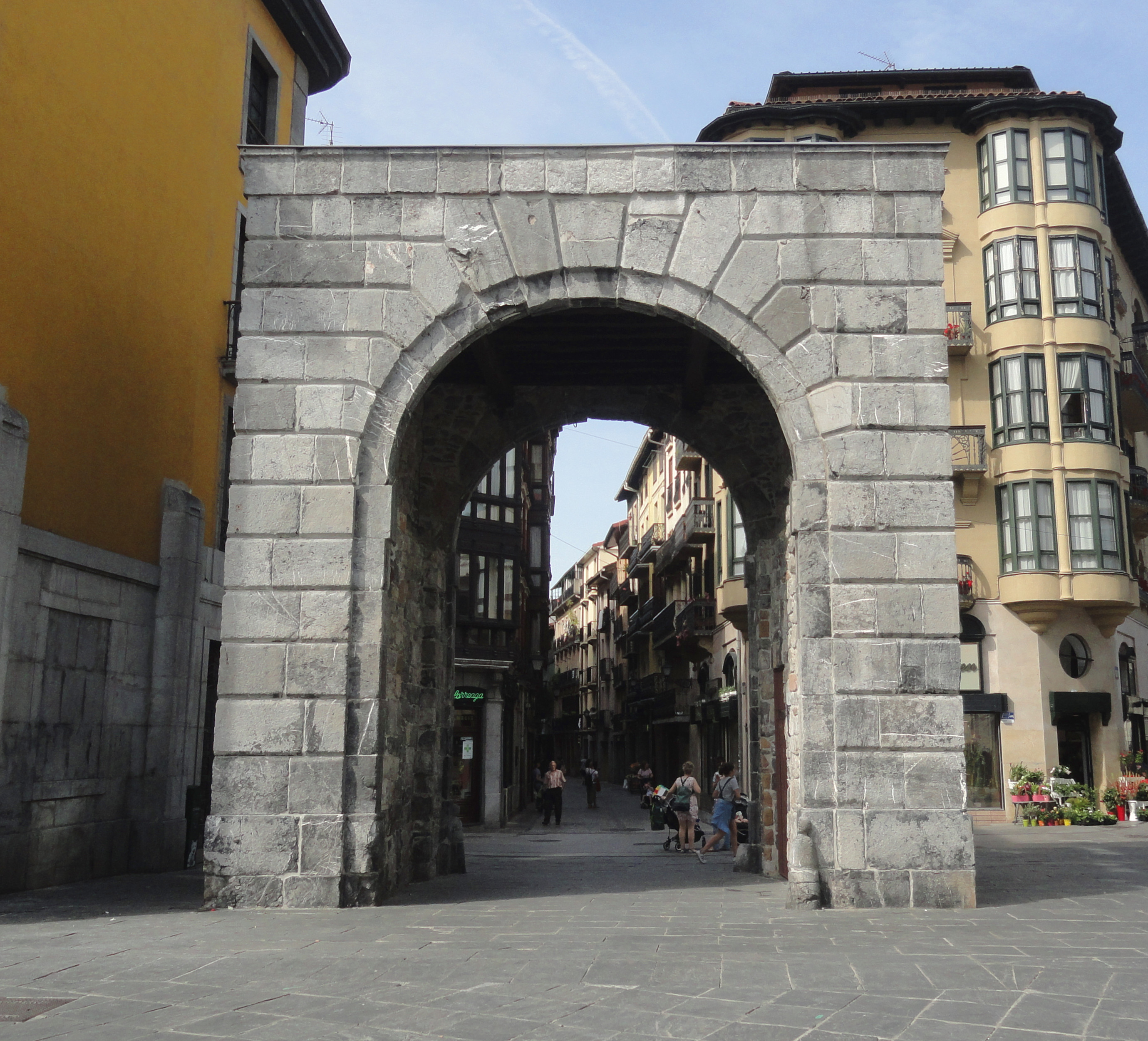 Gaztelako atea - Tolosa